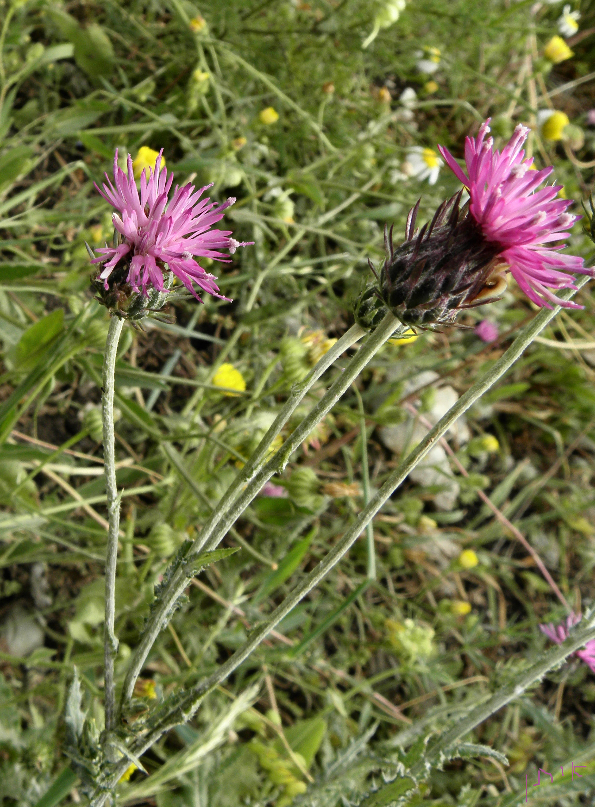 Carduus argentatus קרדה מכסיפה - ליד יקנעם